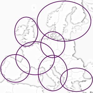 Cobertura del S-DMB